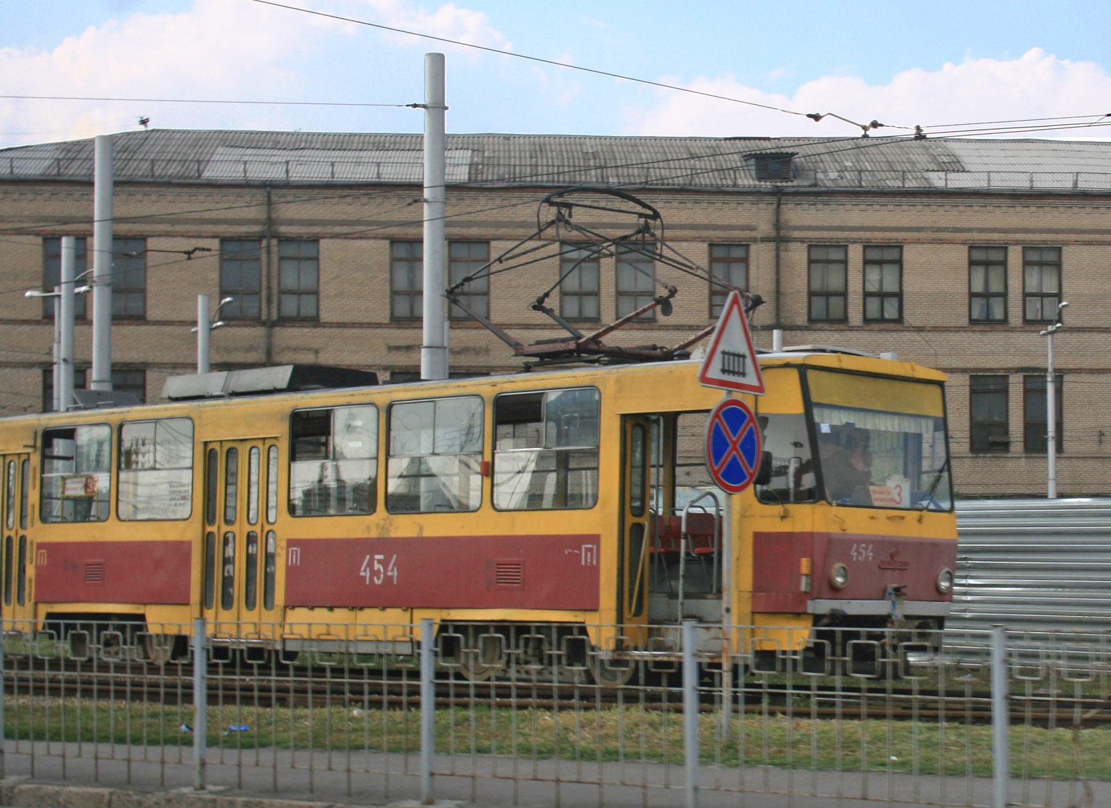 Запорожский трамвай. Маршрут №3. Трамвайное кольцо возле вокзала Запорожье-1